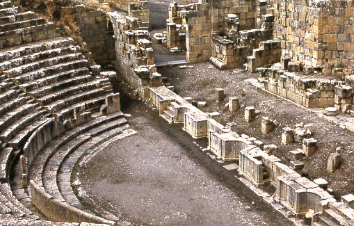 Ruines romaines de Djemila (Algérie)